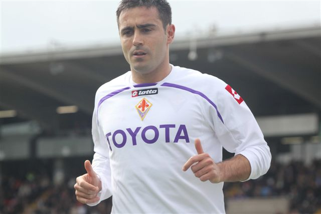 Il centrocampista della Fiorentina Marco Marchionni.